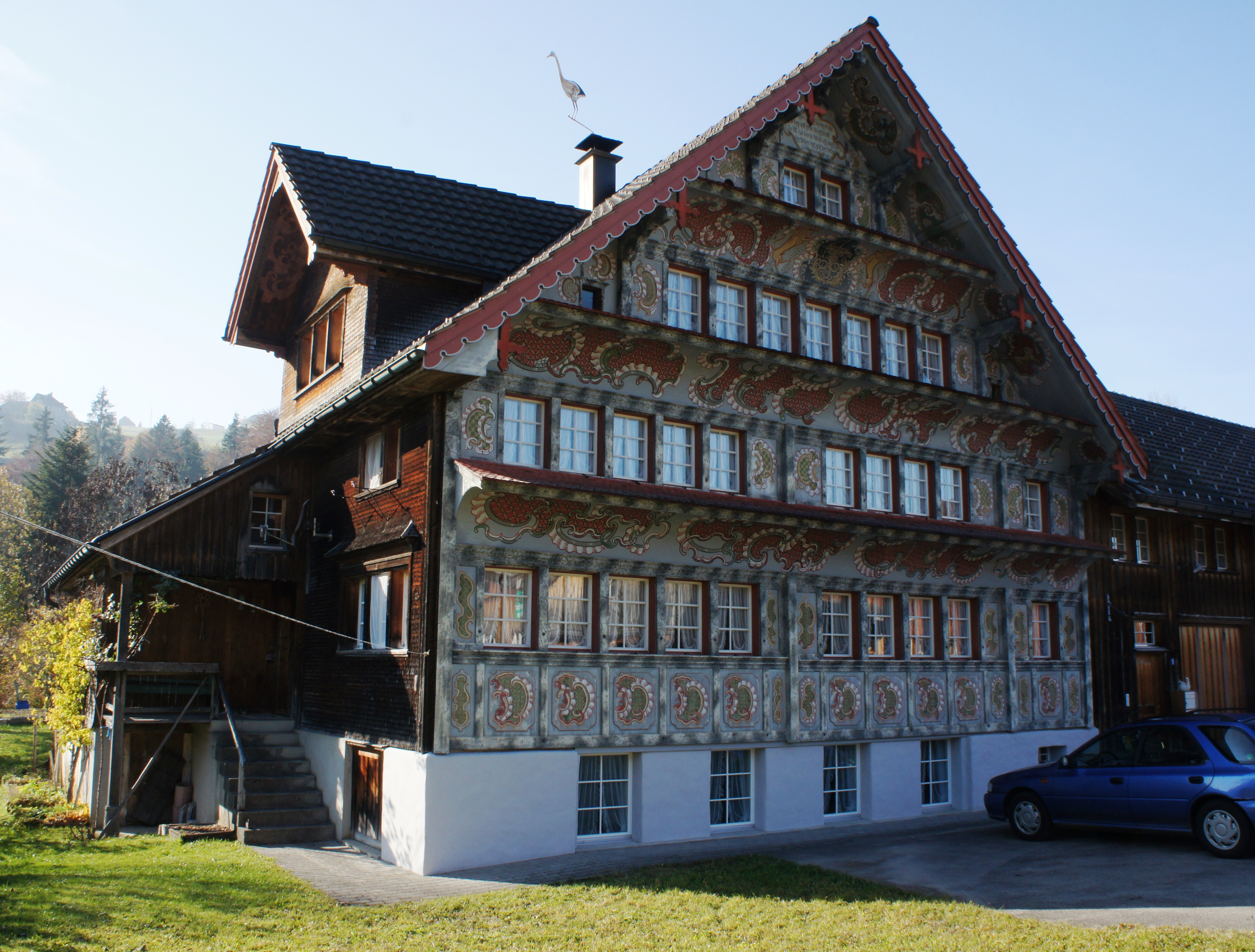 Blick von Südosten auf die Hauptfassade des Roten Hauses unterhalb vom Weiler Bächli, Gemeinde Hemberg. Das Kellergeschoss ist gemauert, der obere Teil ist ein Holzbau. Das Haus hat vier Stockwerke, davon zwei unter dem Dachstock. Die ersten drei Fensterreihen sind mit einer Schindel-Simse überdacht. Die ganze Fassade inkl. Dachuntersichten sind mit Ornamenten reich bemalt. Rechts ist eine Scheune in Kreuzgiebelform an das Wohnhaus angebaut. Links führt eine steinerne Treppe zum Eingang, der sich unter dem verlängerten Vordach befindet. Diese (Süd-)Seite ist mit braunroten Schindeln beschlagen. Auf dem Dach über dem Eingang ist eine Giebelgaube mit dreiteiligem Fenster. Auch hier ist das Vordach bemalt. Mitten auf dem Dachfirst ist ein Kamin mit einer Windfahne, die einen Storch darstellt. Das Kellergeschoss ist weiss verputzt, die Fassade hell graublau, die Ornamente in Rot, ebenso die Schindeln auf den Simsen und die Dach-Abschlüsse.